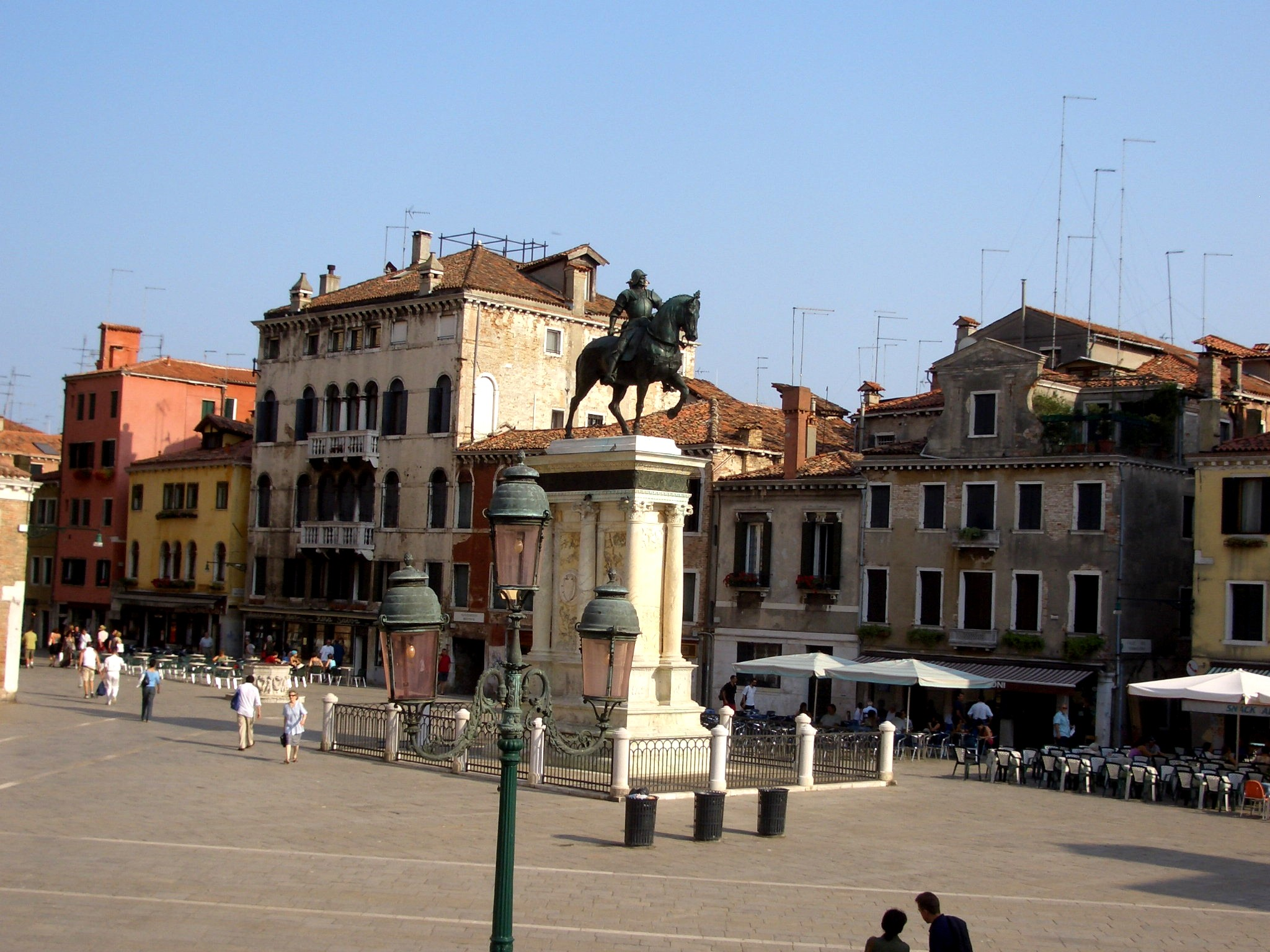 Campo Santi Giovanni e Paolo a Venezia. Foto scattata da me il 29.6.06.